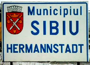 Zweisprachiges Ortsschild von Sibiu/Hermannstadt in Rumänien. Bilingual town sign of Sibiu/Hermannstadt in Romania.